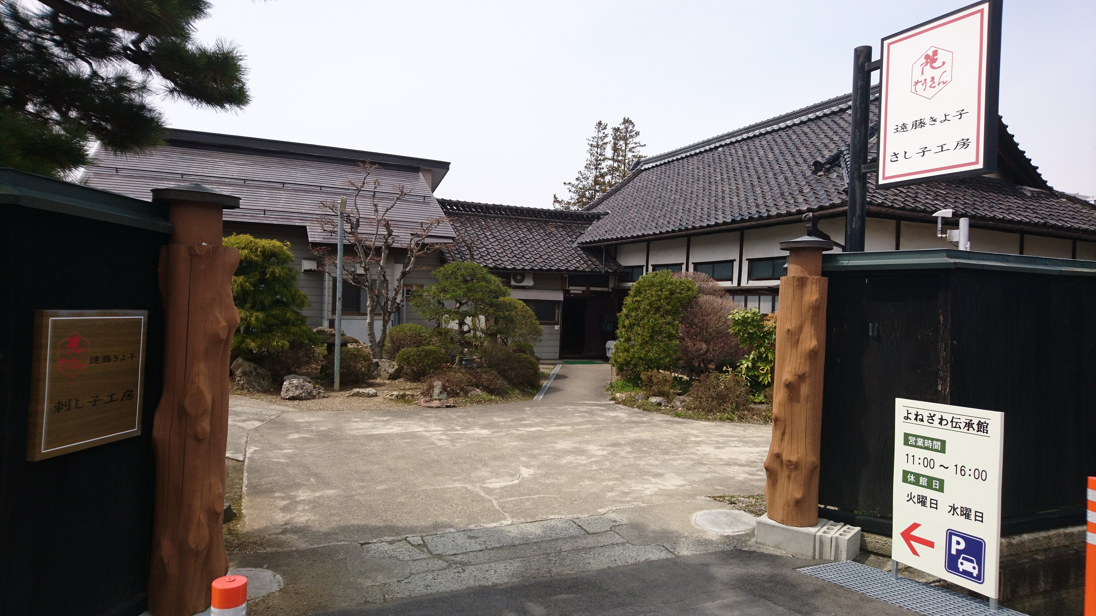 〒992-0039 山形県米沢市門東町1丁目1-11に所在する原方刺し子等の伝統工芸施設。